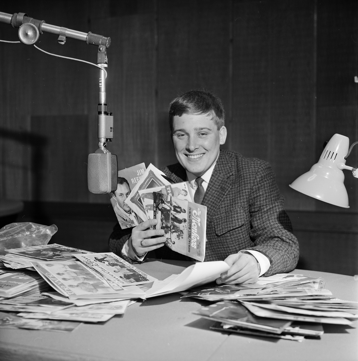 Vidar Lønn-Arnesen (født 1940) er en norsk sanger, underholder og programleder kjent fra en rekke radio- og tv-programmer med populærmusikk i NRK, blant annet Norsktoppen, Ti i skuddet, Da Capo samt Puslespill i Barne-TV.